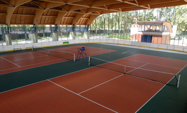 korty tenisowe z nawierzchnią Power Game (ITF-kat.5 "FAST")